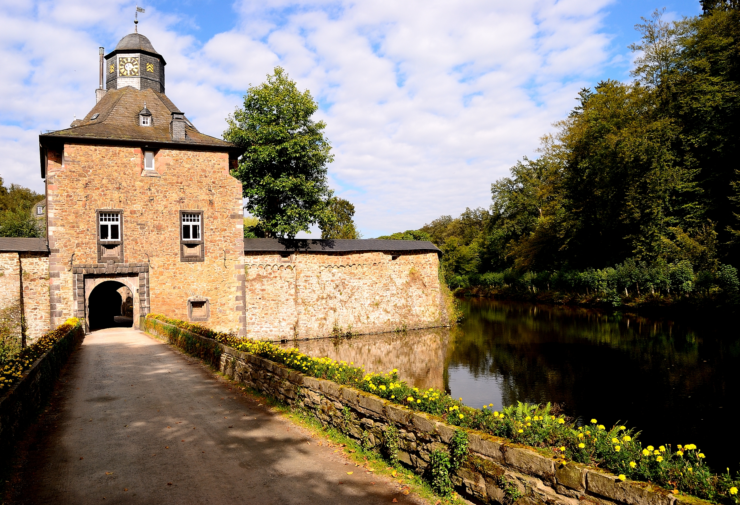 Der Torbau des Schlosses Crottorf bei Friesenhagen im Wildenburger Land